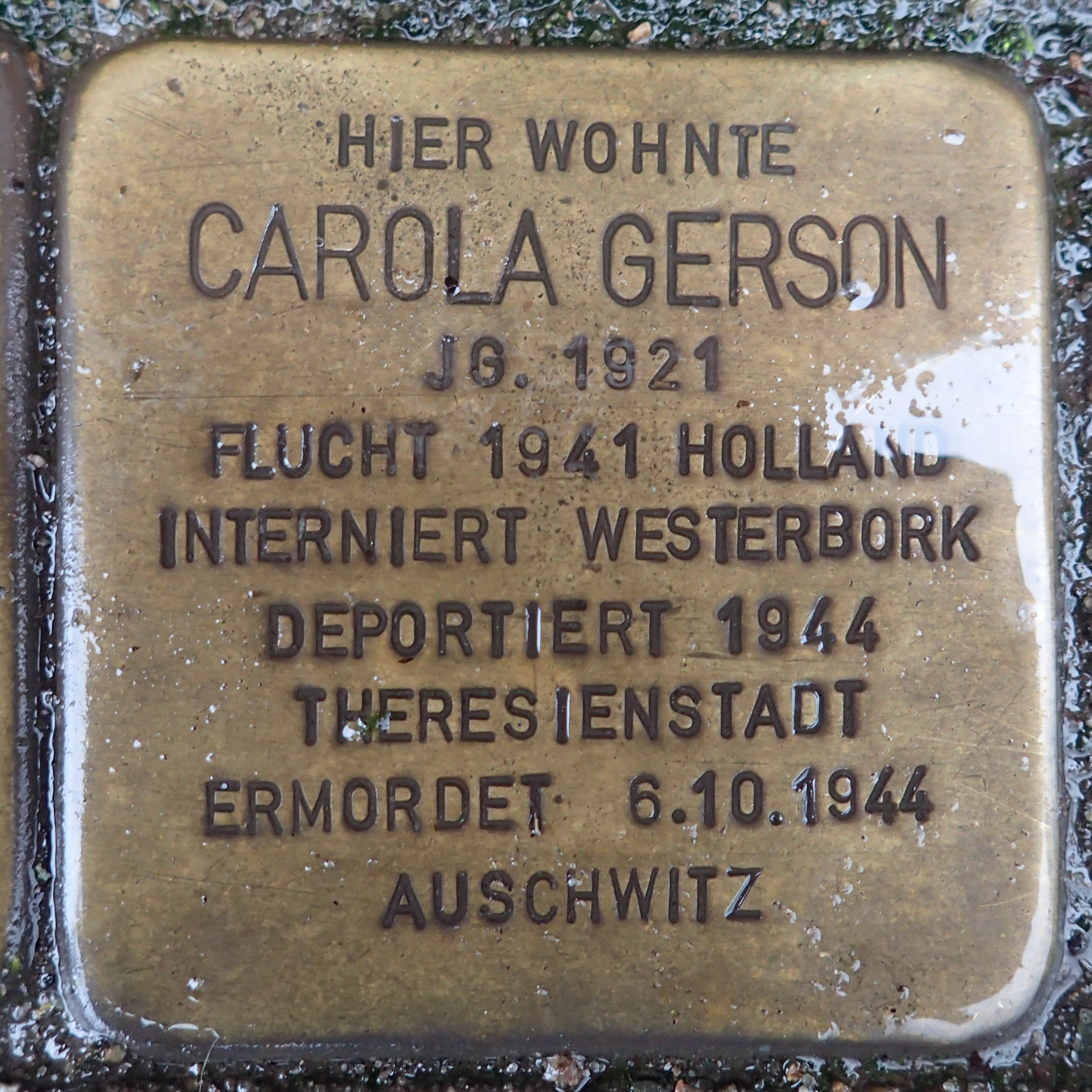 Stolperstein Geldern Bahnhofstraße 36 Carola Gerson